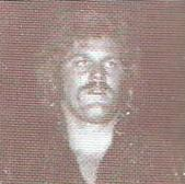 Black Angus dans un programme de catch du 10 octobre 1977 à Wichita, Kansas